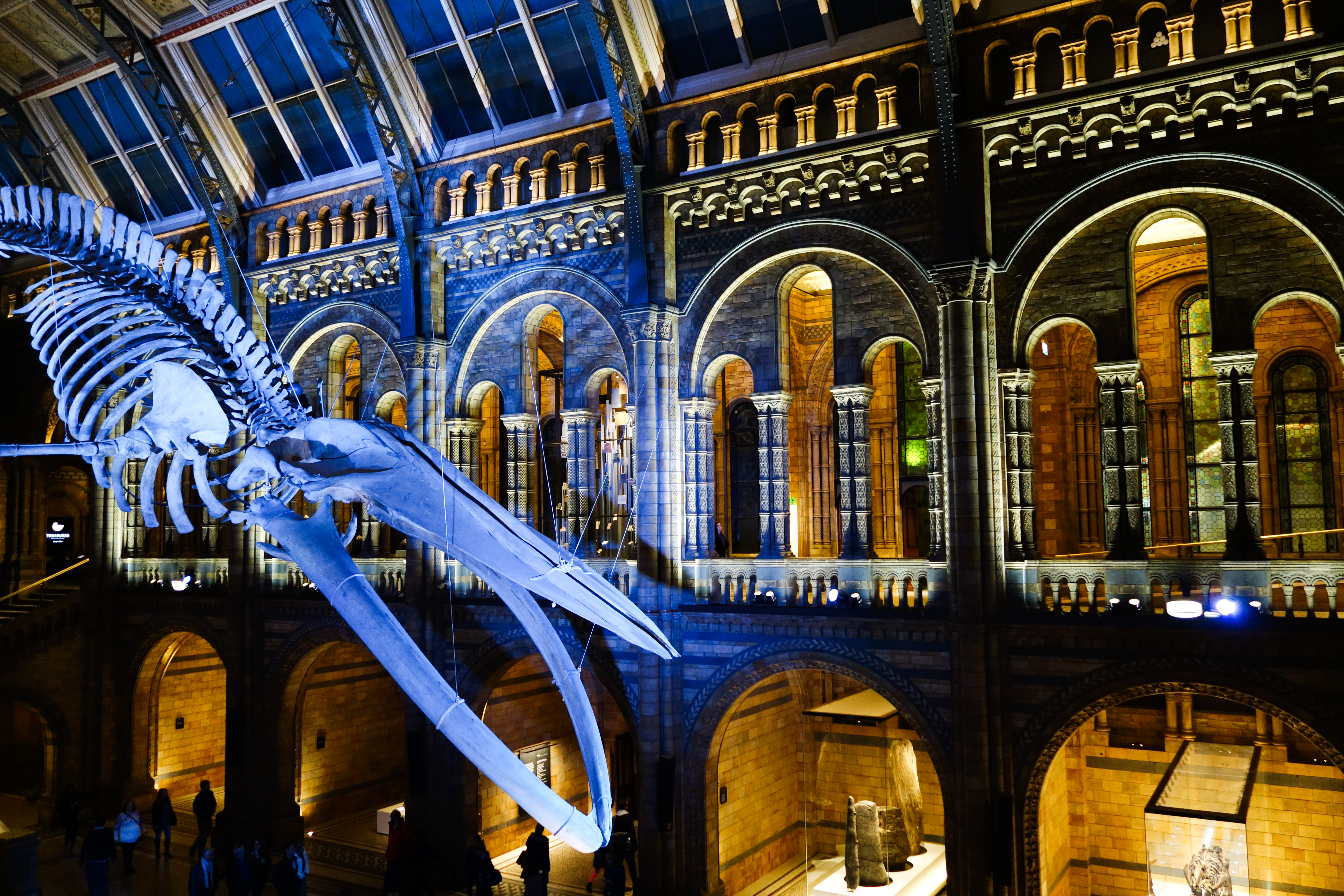 London, 2017